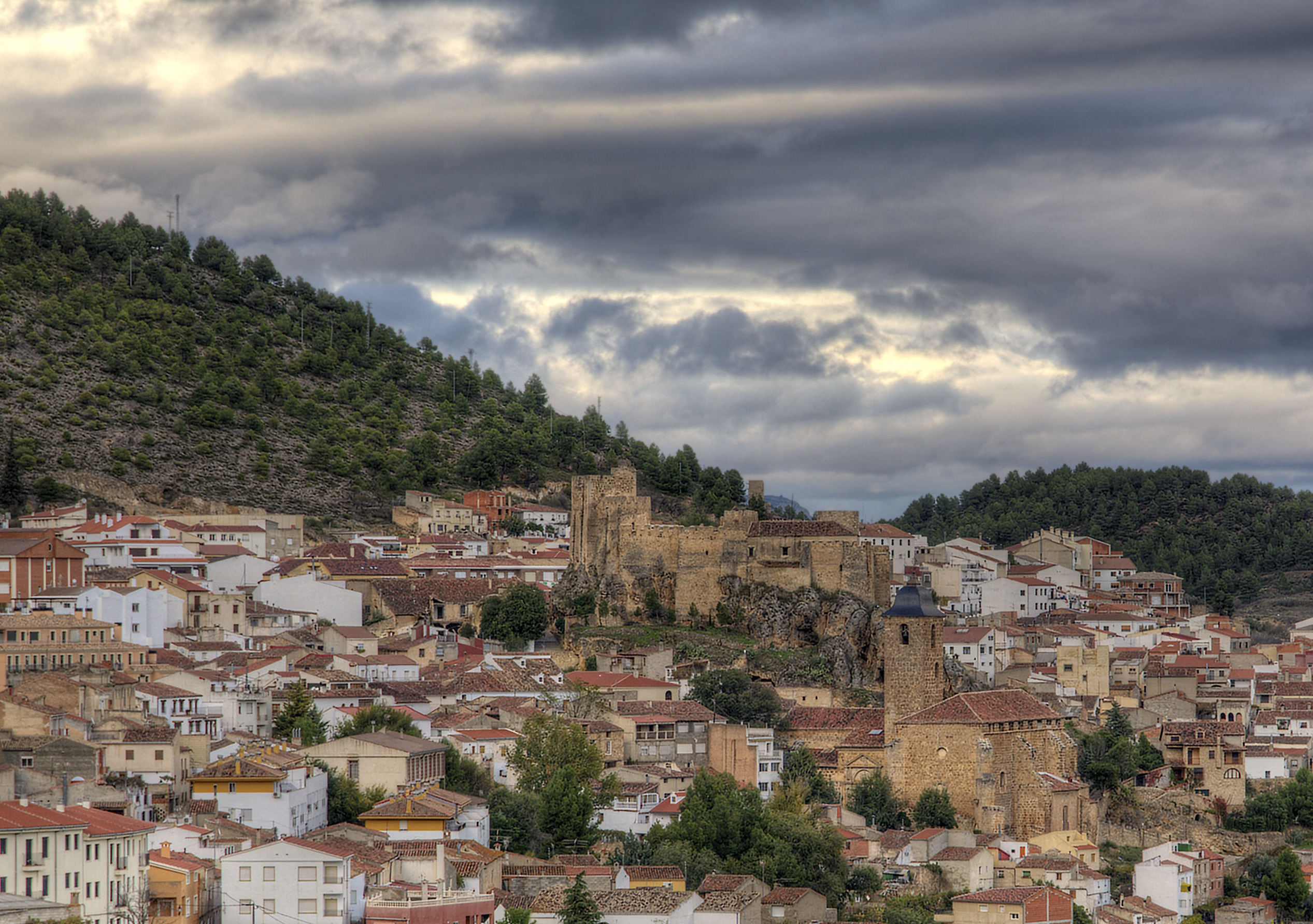 Yesta, Albacete. España